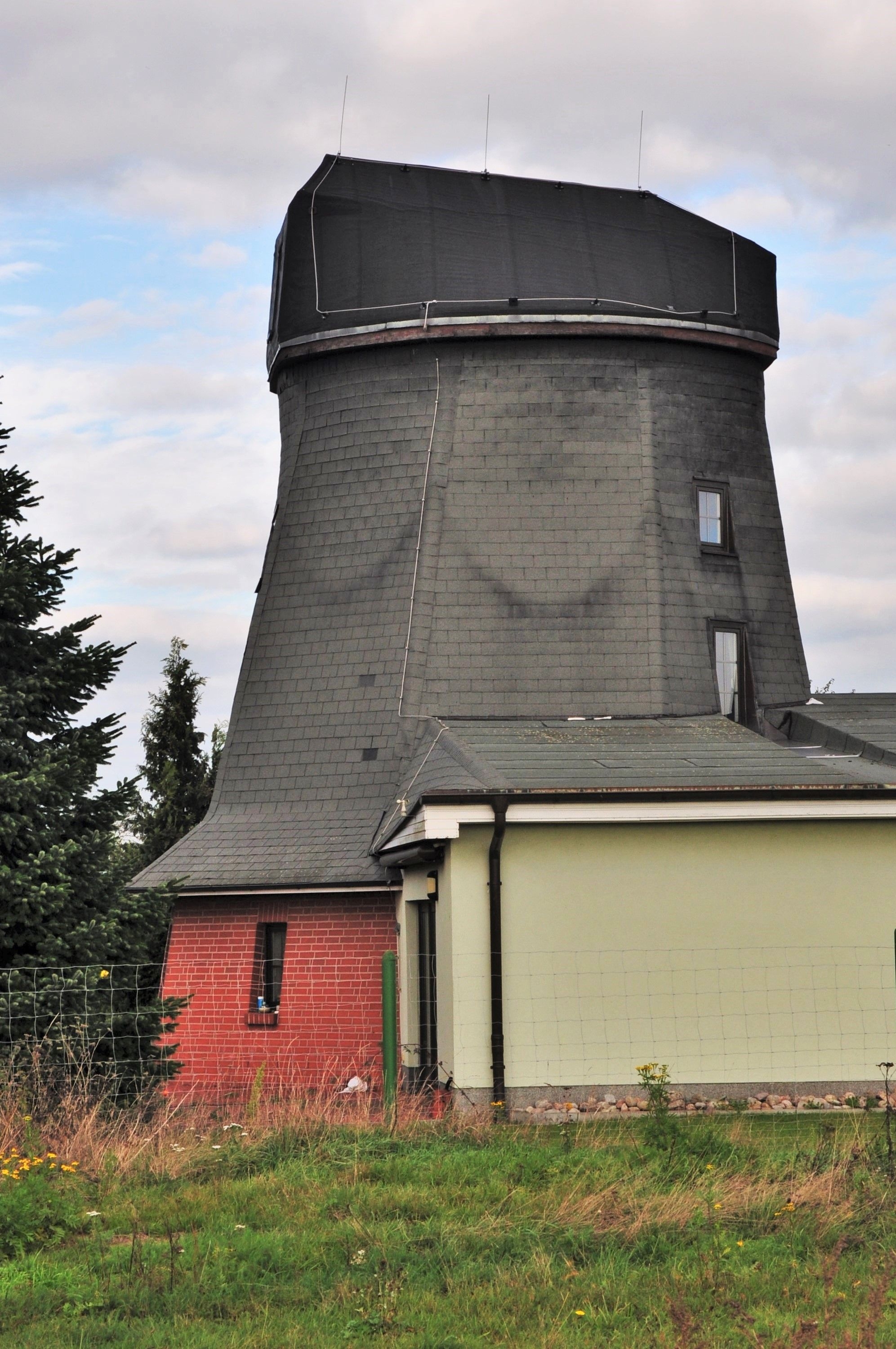 Die Gebäudehülle des einstigen Achtkant-Holländers wurde neu aufgebaut.